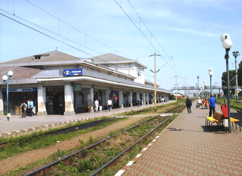 Gara din Paşcani.